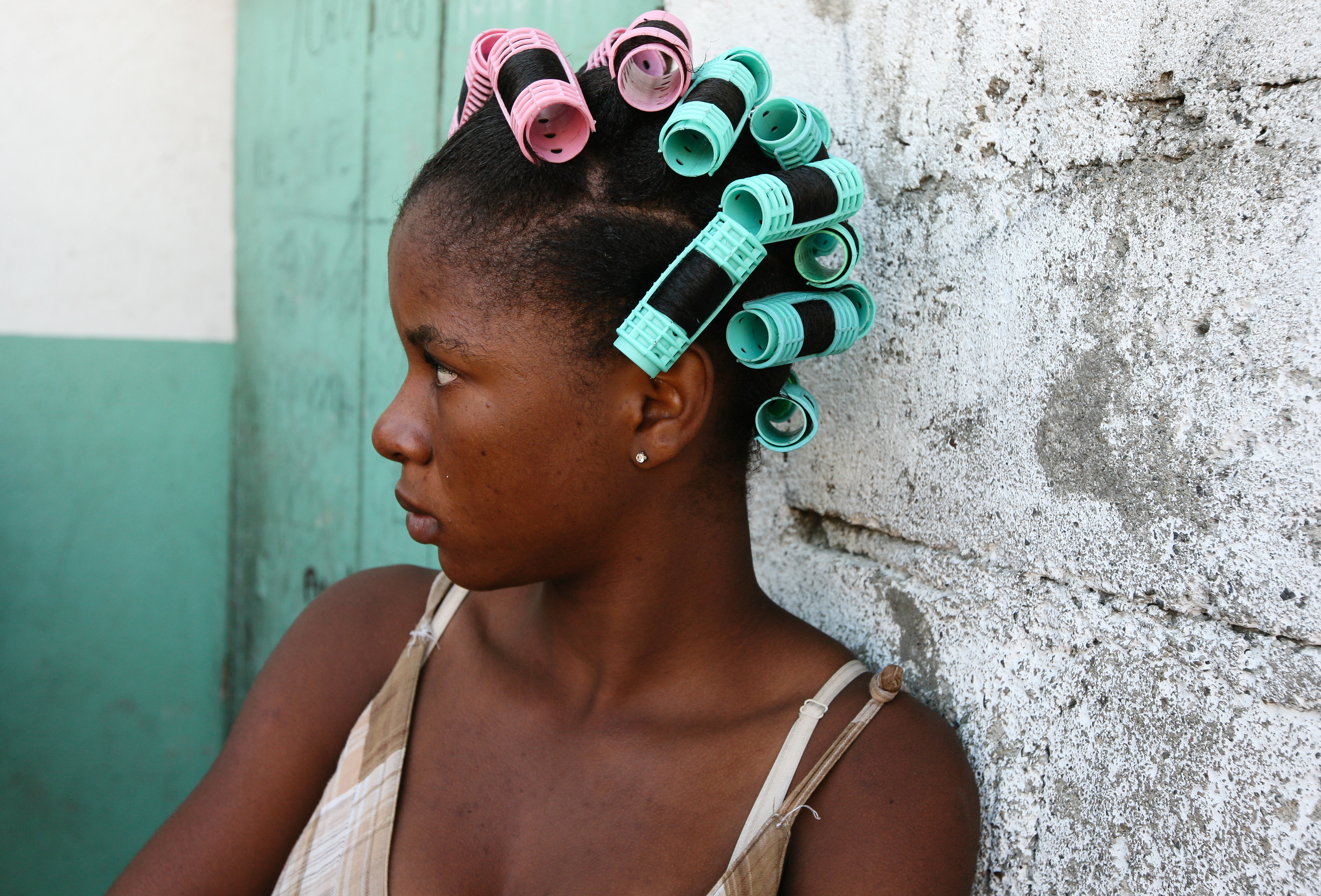 In Curlers